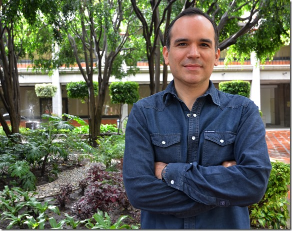 Jesús Mario Lozano en la UDLAP